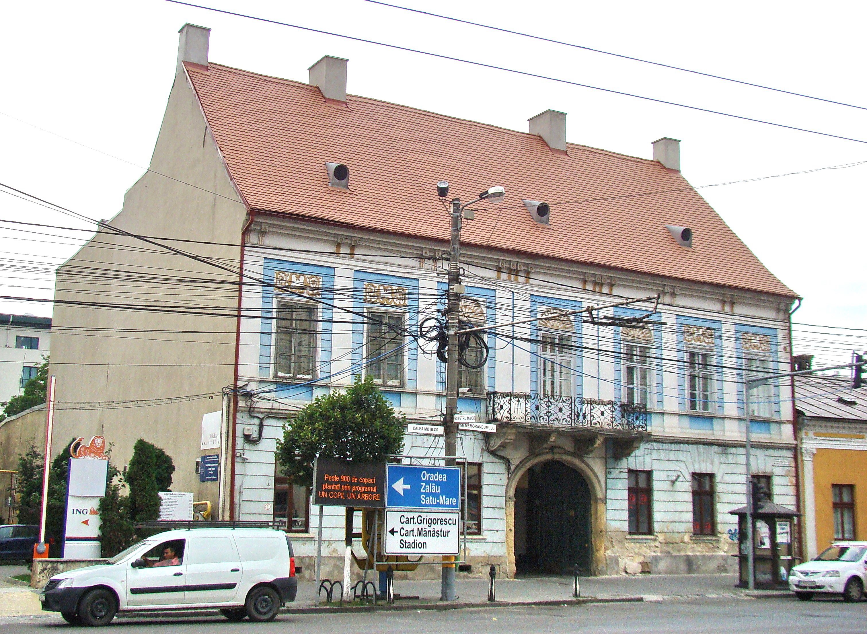 Clădire monument istoric, Calea Moților, nr. 4